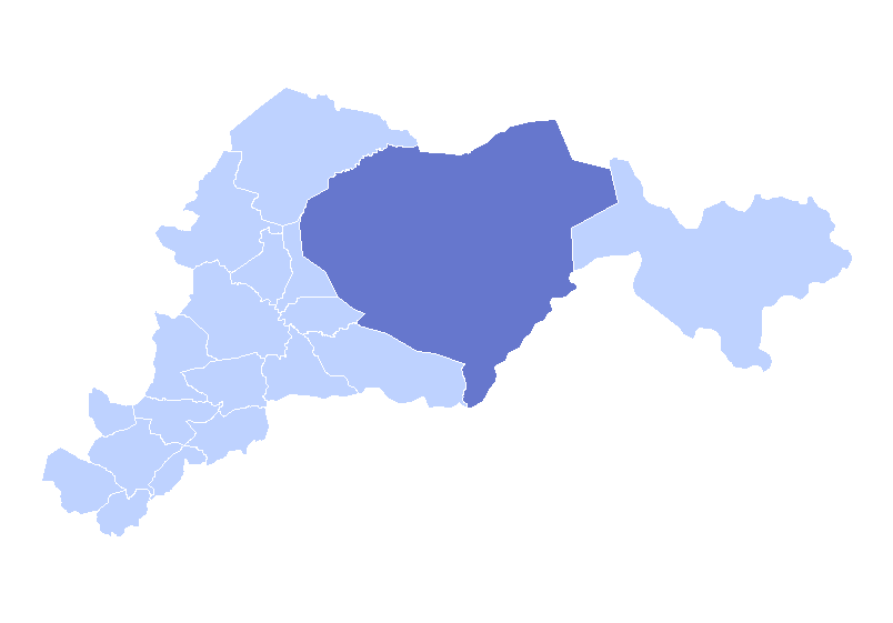 Położenie gminy Danlí na mapie departamentu El Paraíso